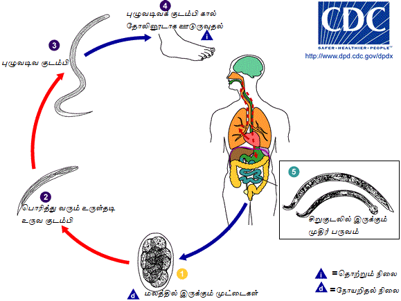 கொக்கிப்புழுவின் வாழ்க்கை வட்டம்